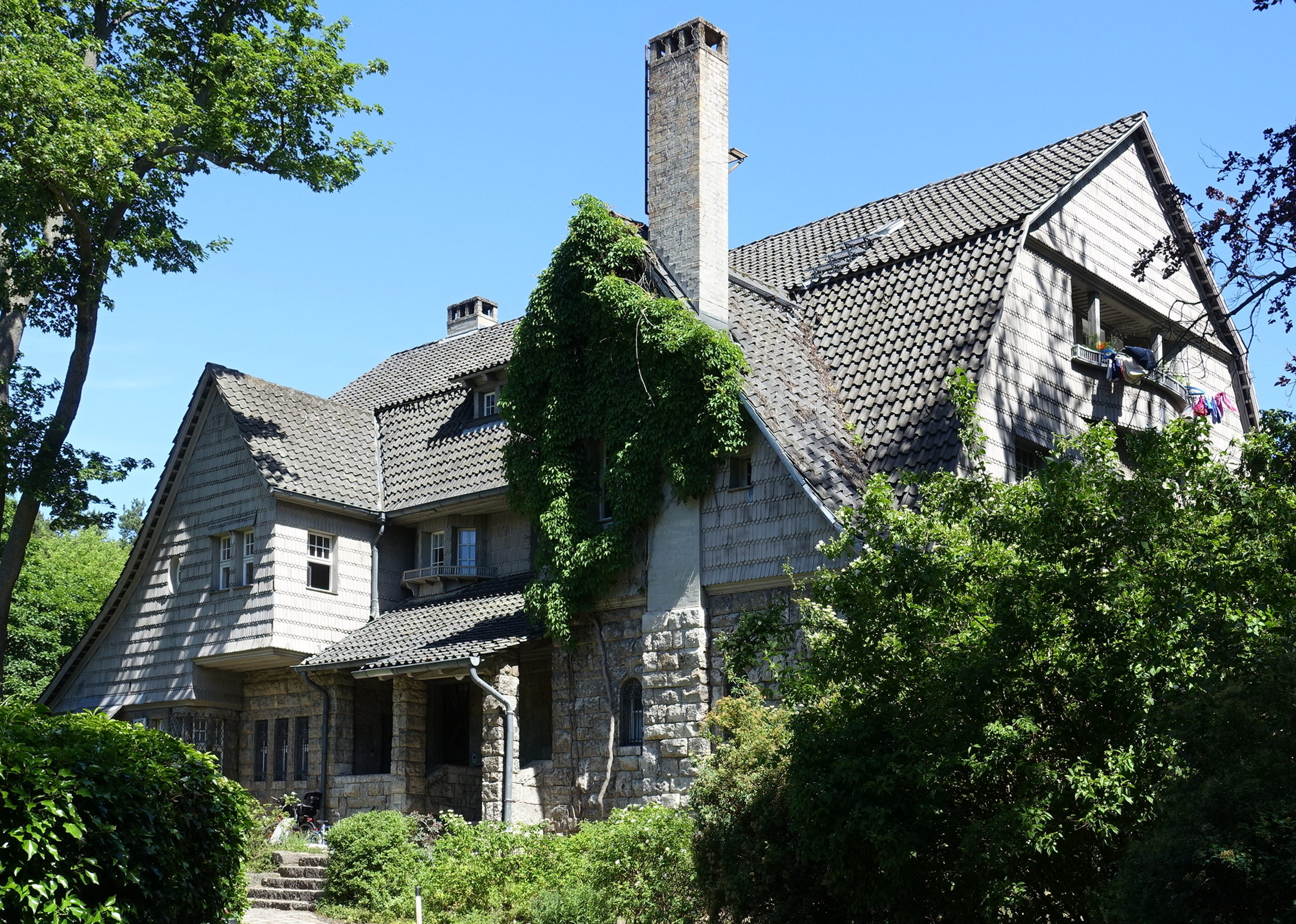 Wohnhaus